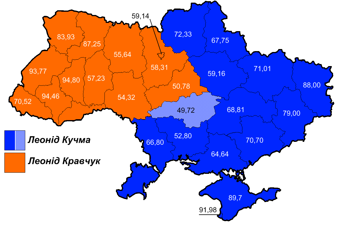 Вибори в Україні 1994. Україномовна версія мапи